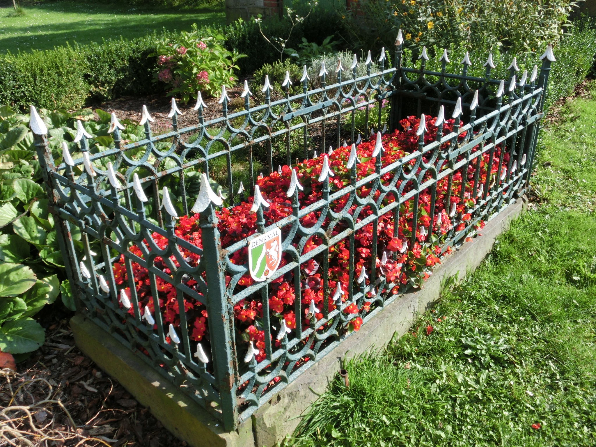 Vlotho - Grab des Quäkers Carl von Tschirschky (1801-1833)